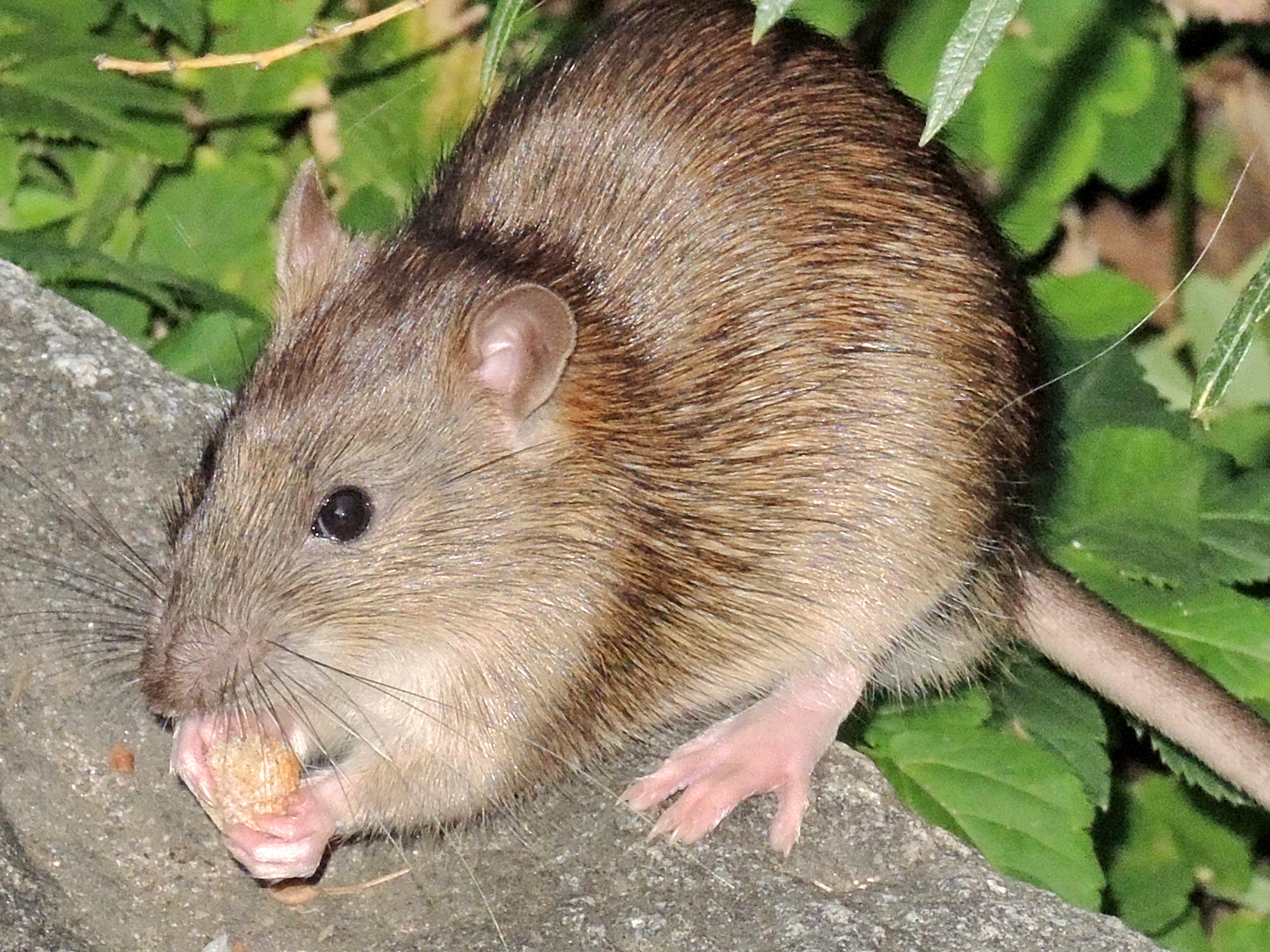 Arboretum in Zürich-Enge